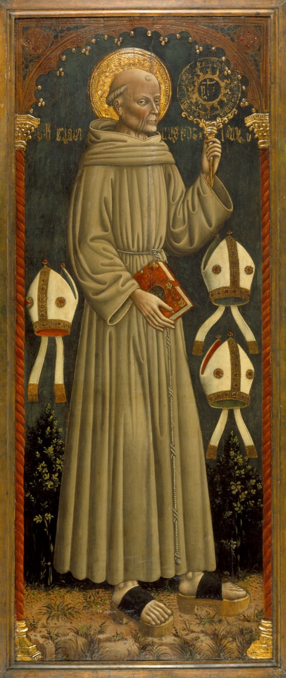 Dario da Pordenone - San Bernardino da Siena olio su tavola - 179,1 x 71,8 cm eseguito tra il 1460 - 1470 Los Angeles County Museum of Art